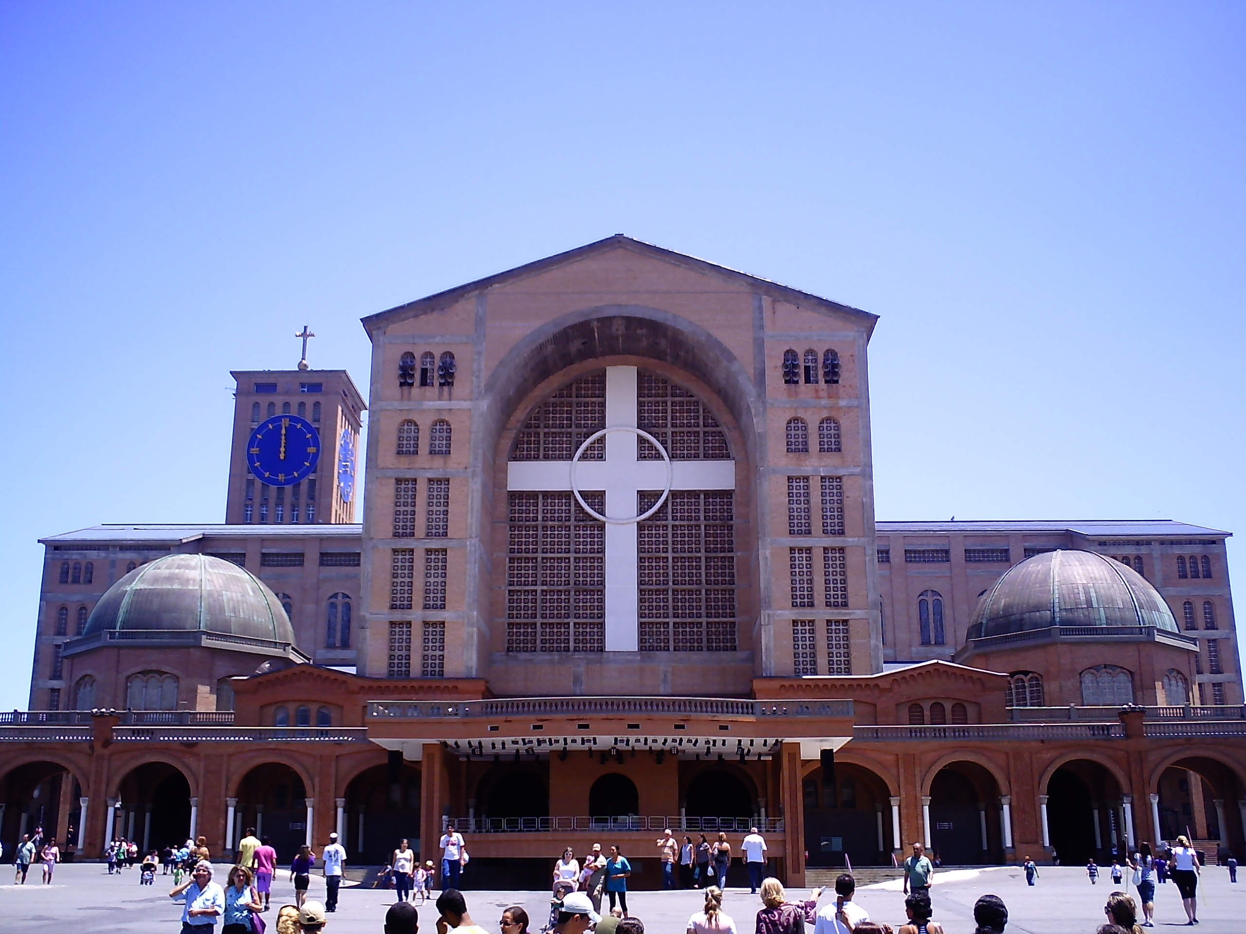 Sul da Basílica de Nossa Senhora Aparecida, com relógio da torre apontando meio-dia.